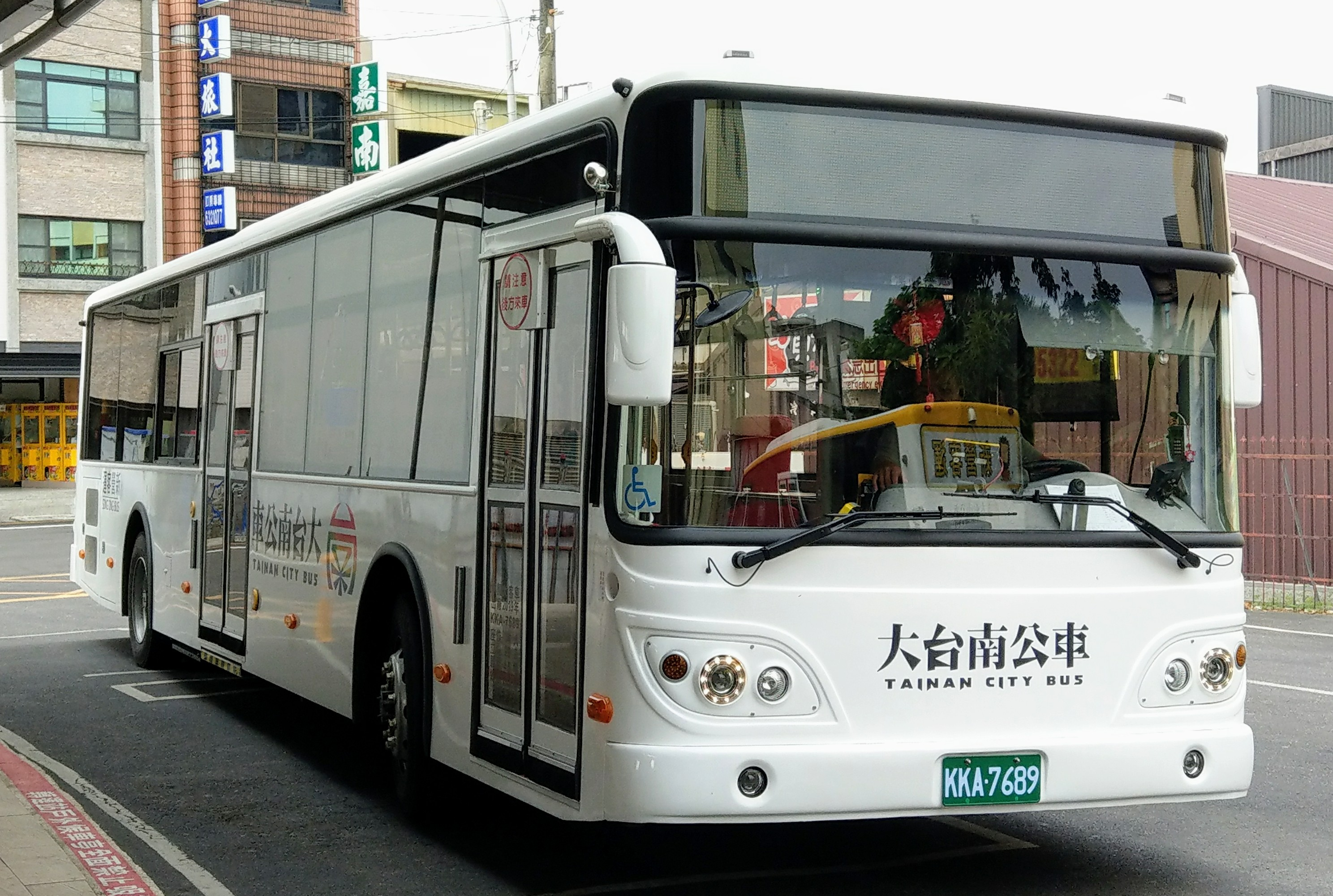 新營客運2019年9月出廠 成運MB120NS，青山外宿車KKA-7689